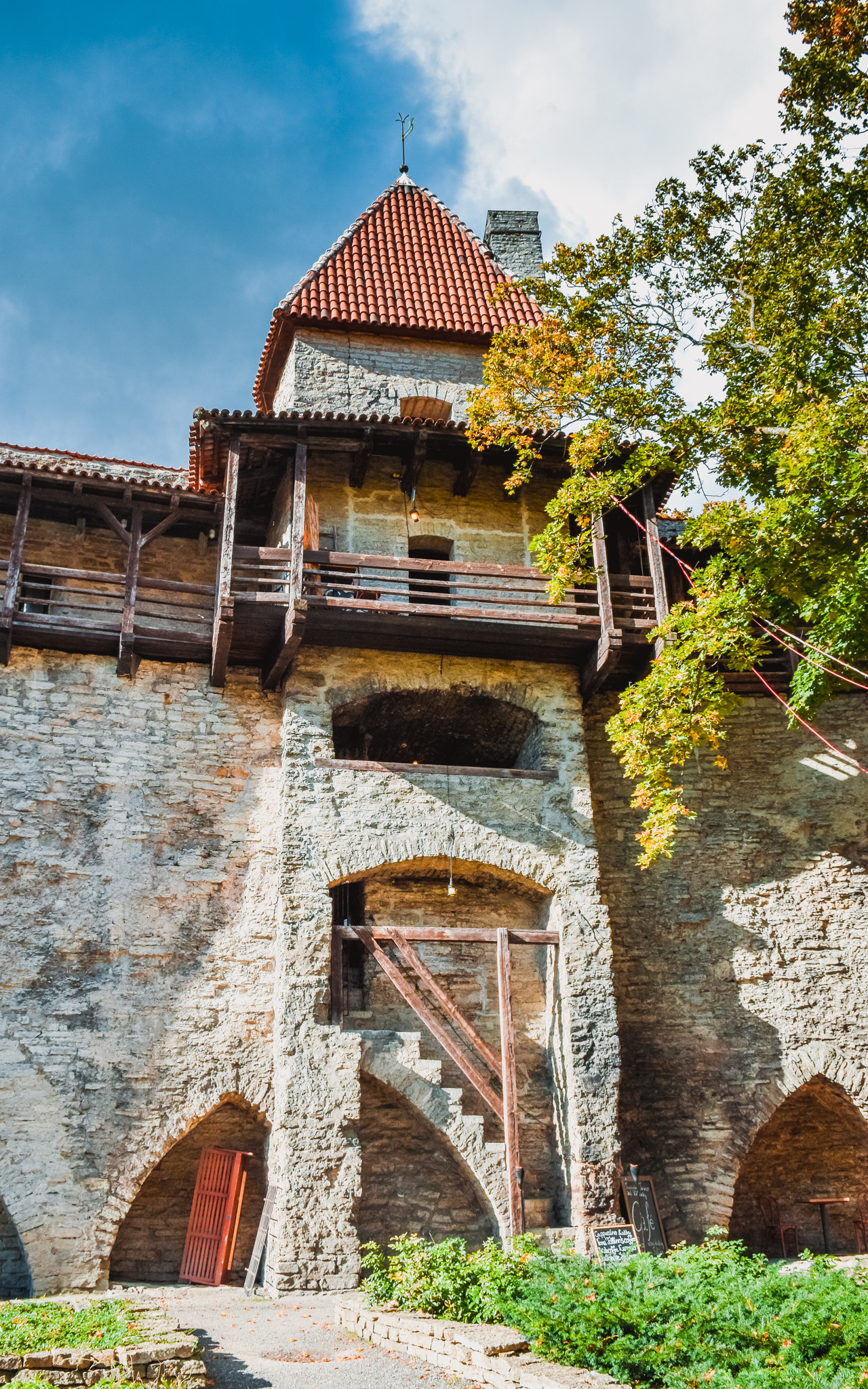 Tallitorn, Tallinn, Estonia